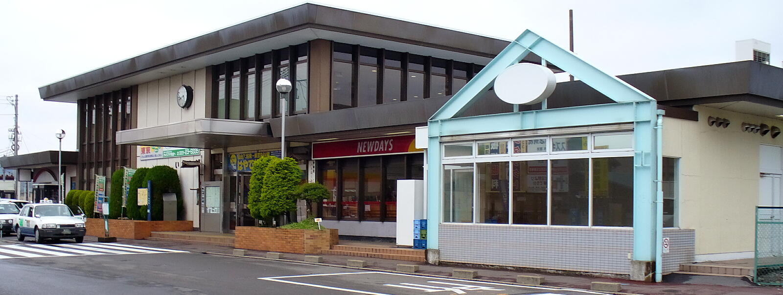 岩沼駅